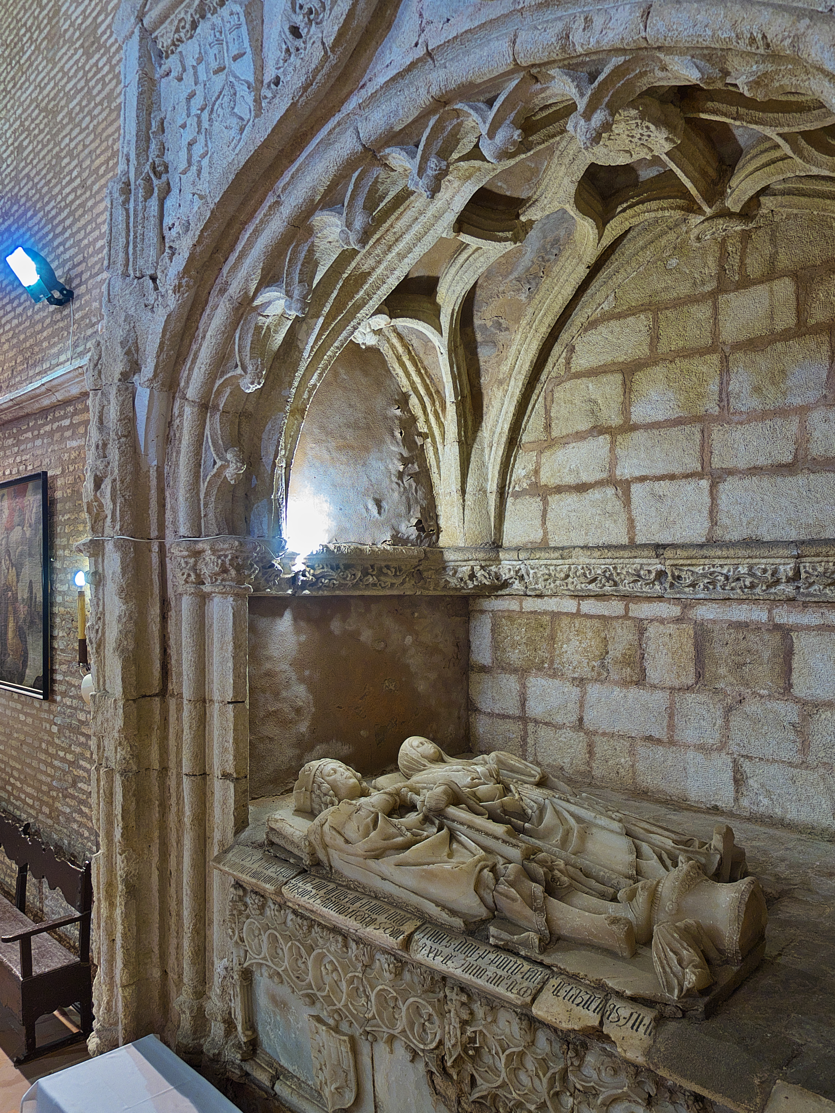 Pedro Portocarrero (VIII Señor de Moguer) (1471-1519), VI Señor de Villanueva del Fresno, Alcalde Mayor de Sevilla, y su esposa, Juana de Cárdenas.